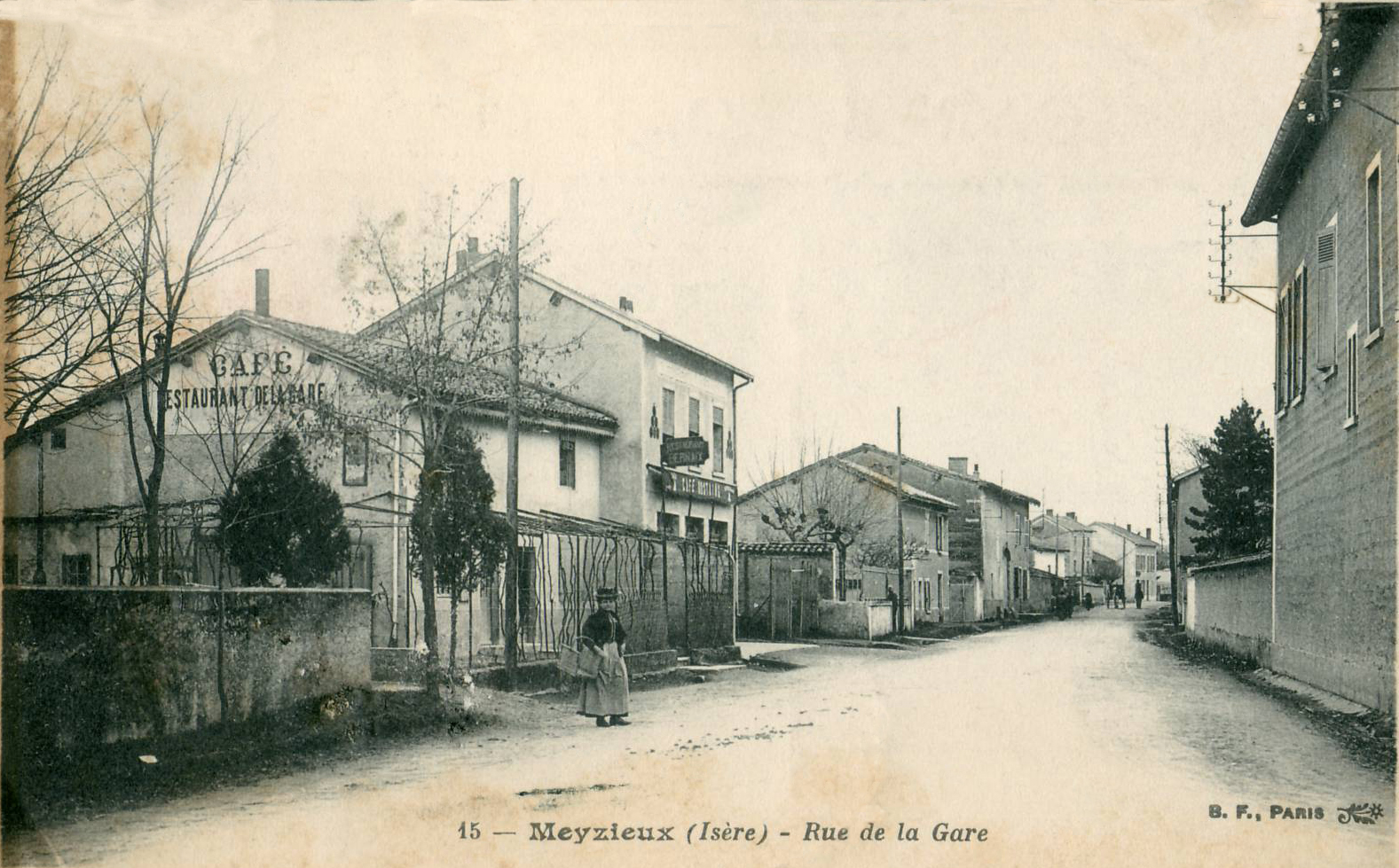 Carte postale ancienne éditée par B. F. à Paris, n°15 :MEYZIEU - rue de la Gare